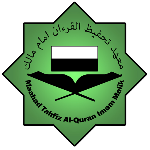 Logo rasmi Maahad Tahfiz Al Quran Imam Malik, Kampung Jergoh Lanchang